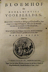 Titelpagina van de "Bloemhof der doorluchtige voorbeelden" van Maria Heyns, uitgegeven in Amsterdam bij Jacob Lescailje in 1647.